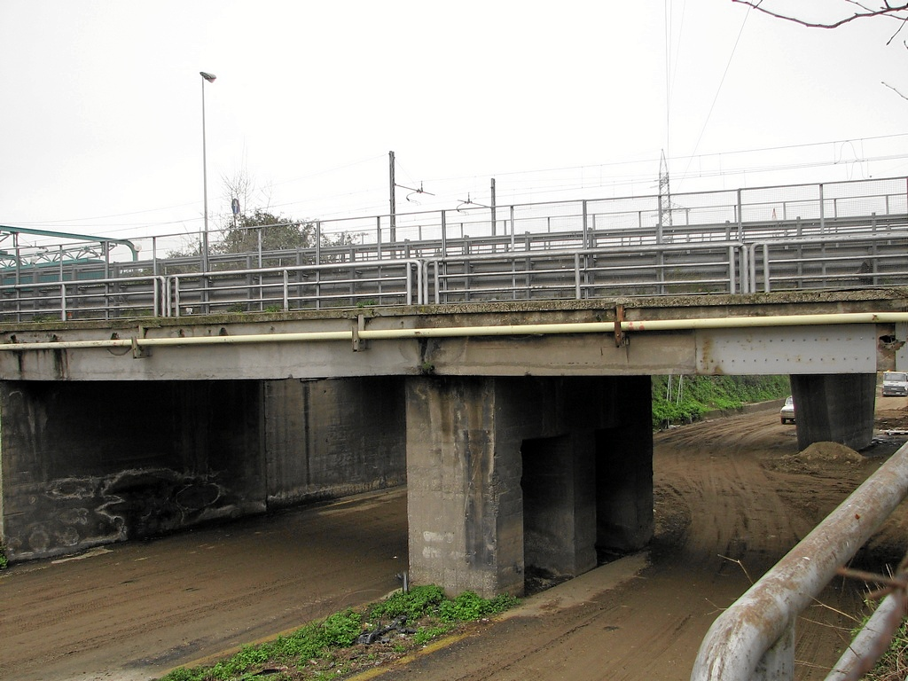 Vecchio tracciato del Grande Raccordo Anulare di Roma, all'altezza di Via Trionfale, febbraio 2007, in corso di demolizione.